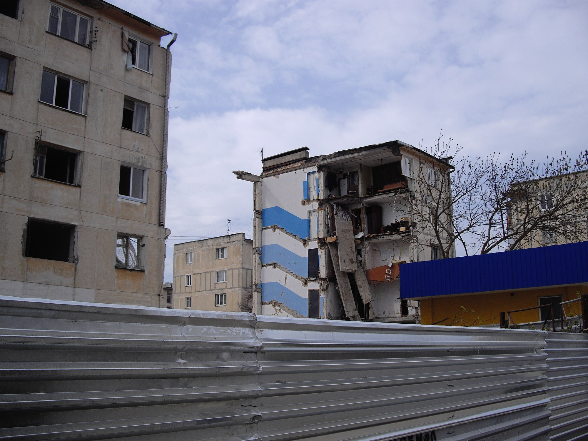 взорвавшийся дом на ул. Некрасова